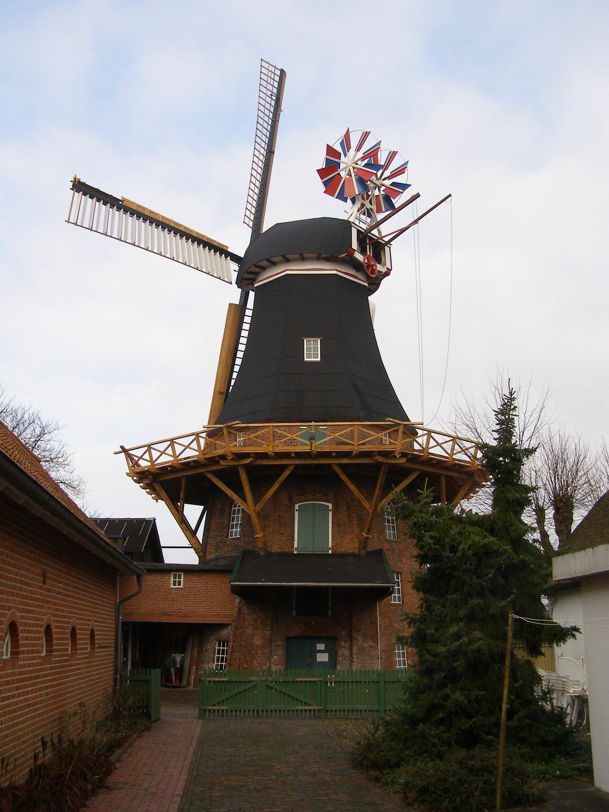 Aufnahme der Moorseer Mühle kurz nach der Restauration der Kappe und der Flügel im März 2005.